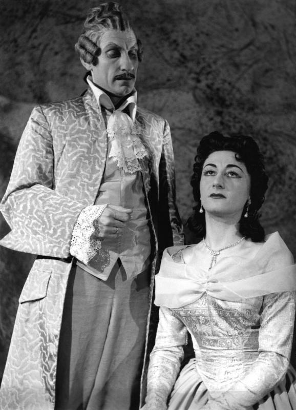 20.11.1954 "Die Macht des Schicksals" (Oper) von Verdi im Stadttheater Bonn